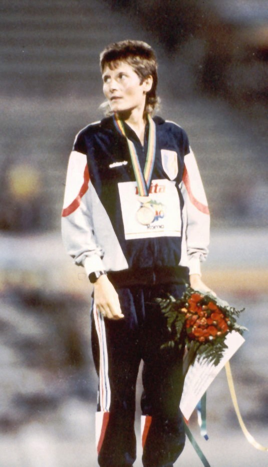 Photo podium médaille de Bronze Marathon Championnat du Monde Athlétisme Rome 1987